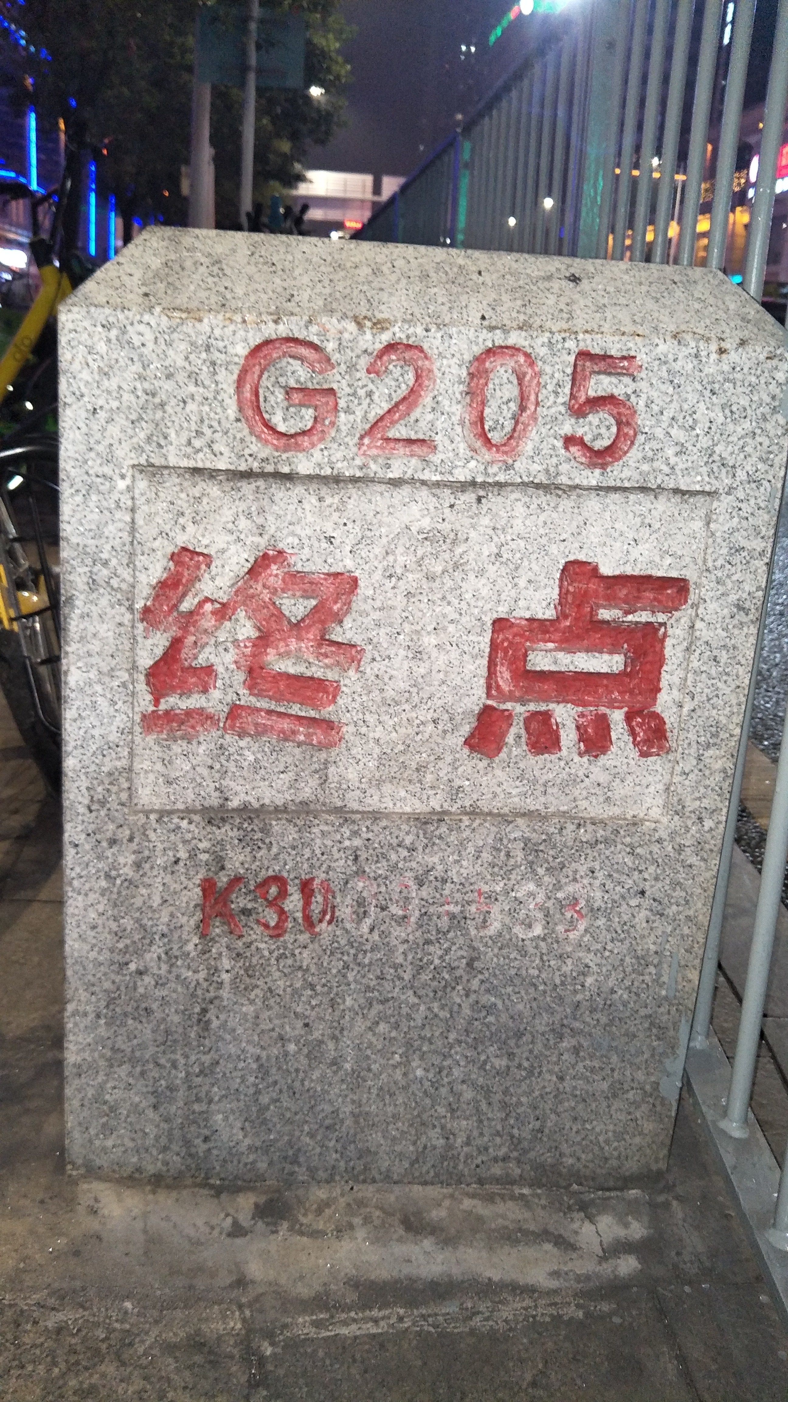 中文（中国大陆）: 205国道位于深圳东门晒布路口的终点里程碑